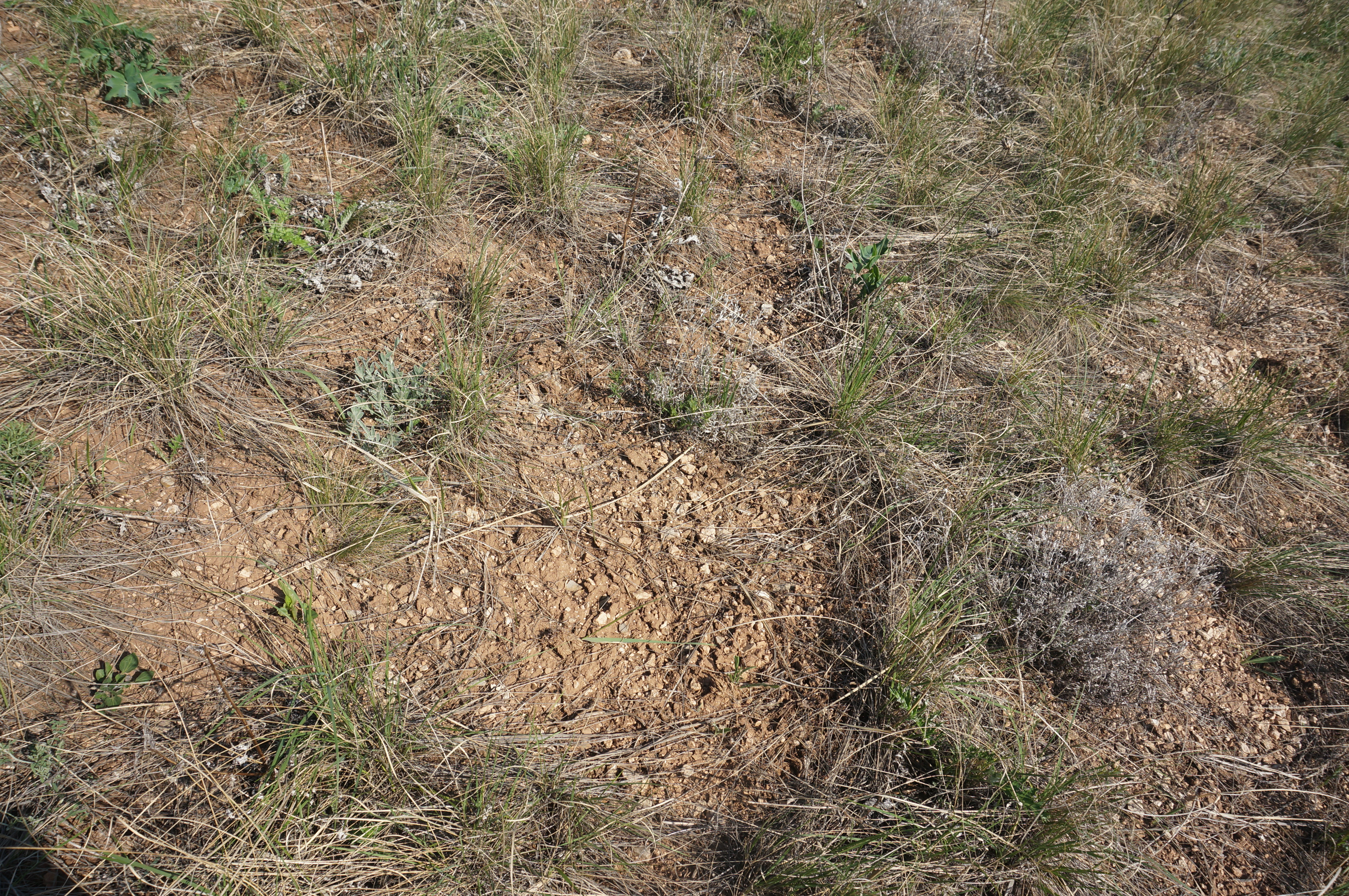 Овраг Верховой, Кинельский район, Самарская область, Россия This image is related to the protected area of Russia number 6310830